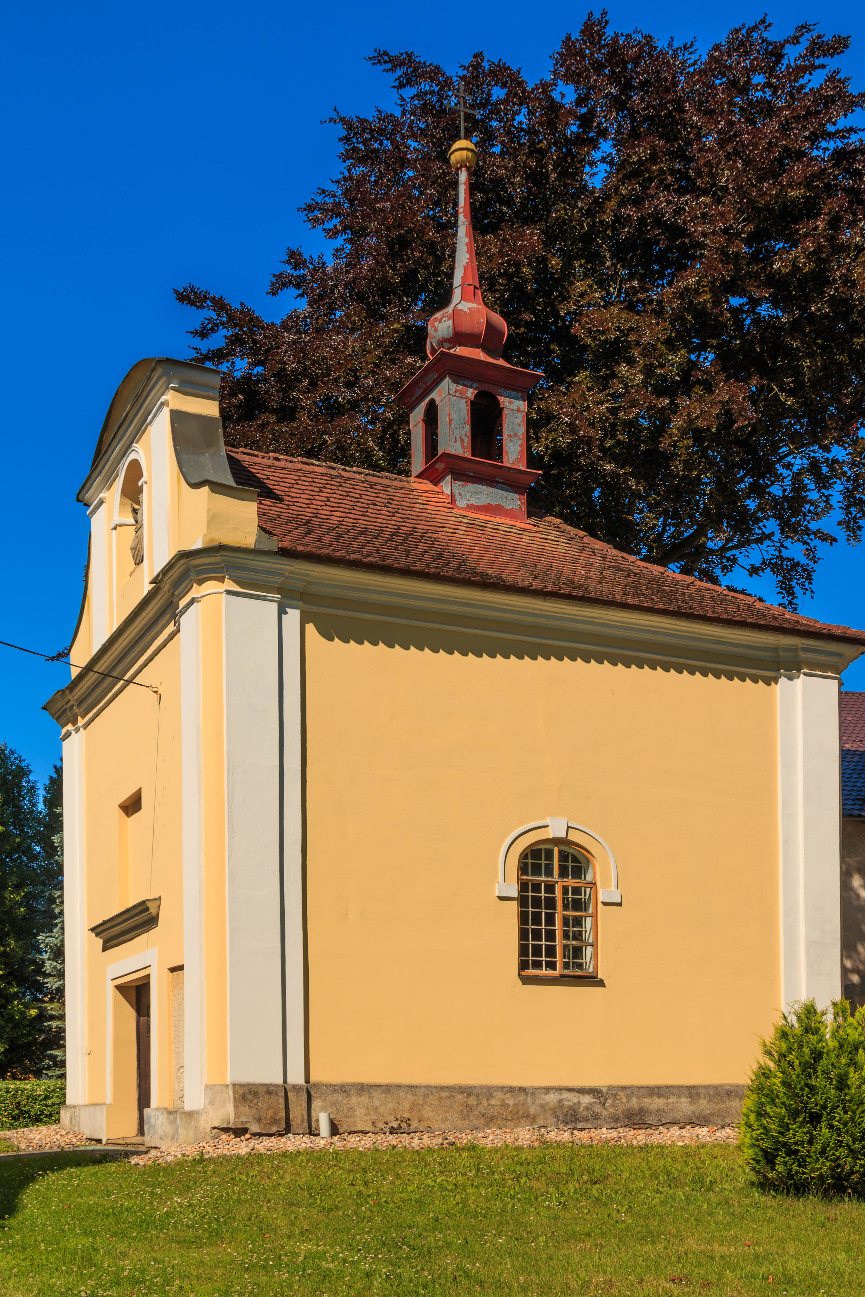 Kostel Nanebevzetí Panny Marie, Žižkovo nám., Habry, Habry.